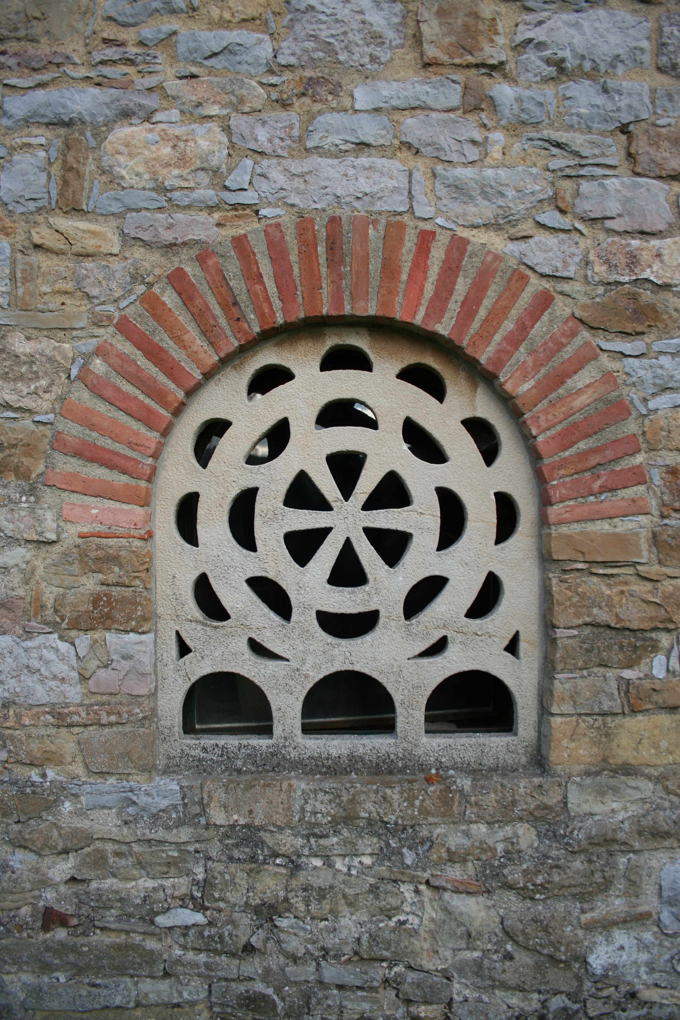 Celosía Santa María de Bendones